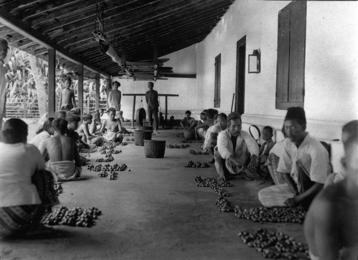 Foto. Het afleveren van de geplukte nootmuskaat noten in de Kombuis van de onderneming Drie Gezusters